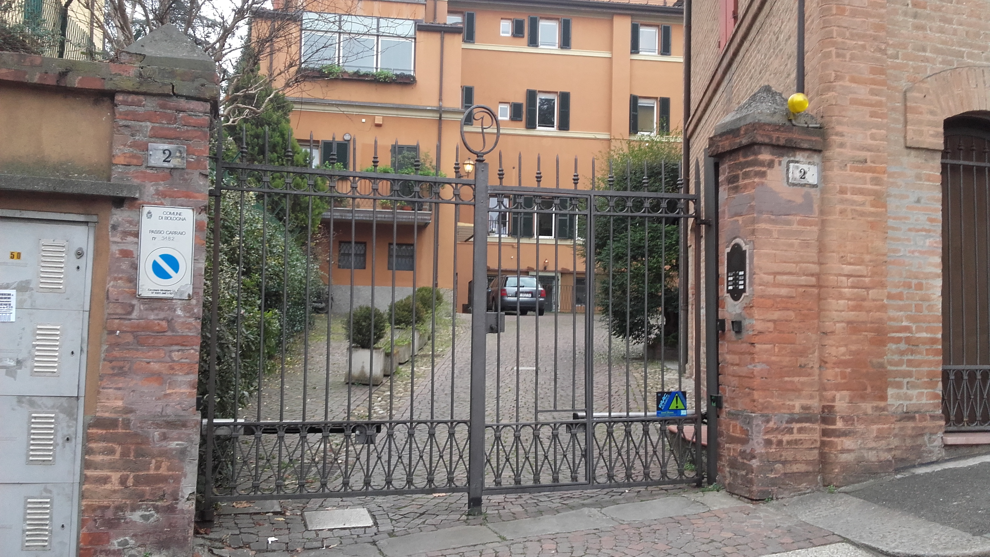 Abitazione ultima di Giovanni Pascoli a Bologna